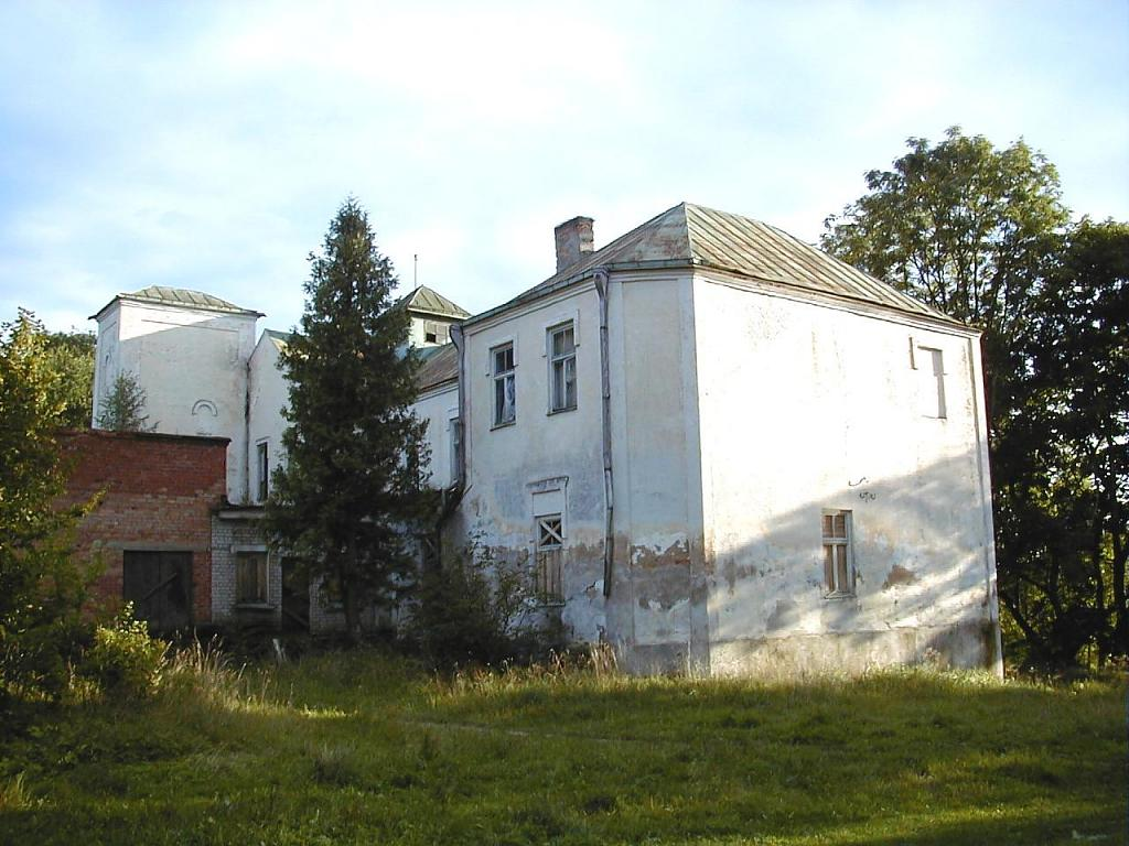 Sāvienas muižas pils 2001-08-25